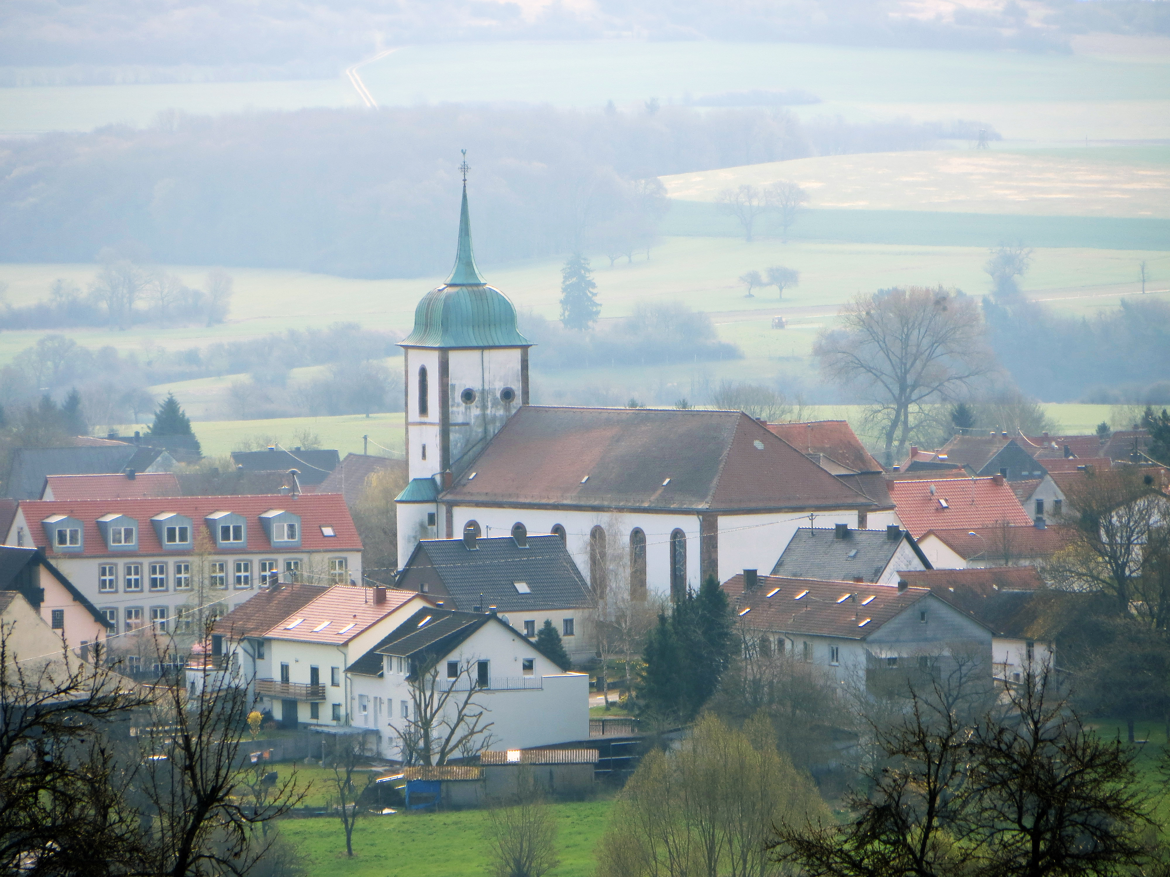 Die Pfarrkirche St. Martin in Medelsheim, Gemeinde Gersheim, Saarpfalz-Kreis, Saarland